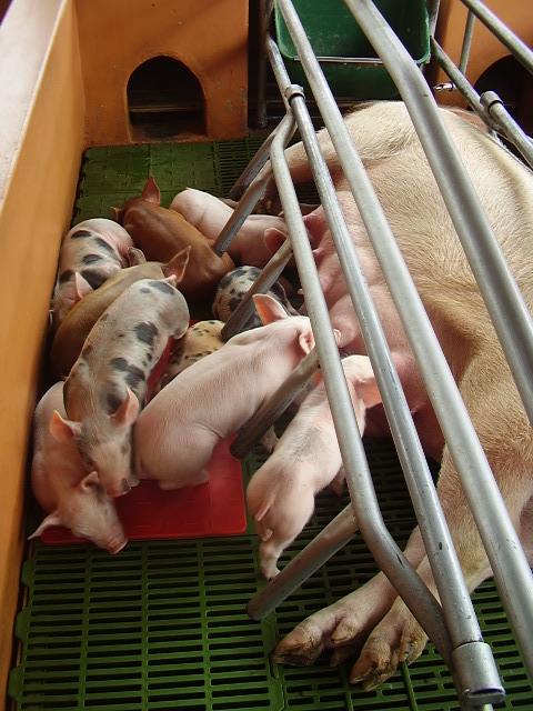 Cerdita amamantando una camada